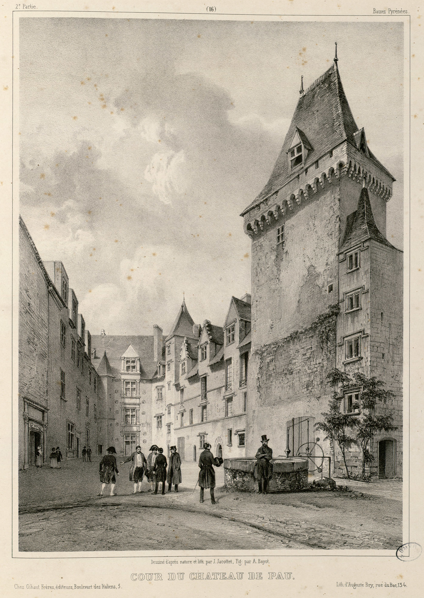 Fait partie de la deuxième partie du recueil "Souvenirs des Pyrénées". Titre lithographié et 51 lithographies. Sur la couverture, l'adresse du lithographe est différente de celle de la page de titre : rue du Bac, 134. Les personnages qui animent les vues ont été dessinés par A. Bayot. Le lithographe de cette deuxième partie est Auguste Bry. L'ouvrage de Jacottet est très rare quand il est complet des deux parties. Vignette lithographiée au titre : "La Roche du Limaçon. Route de Cauterets" Ancely, René (1876 - 1966). Possesseur